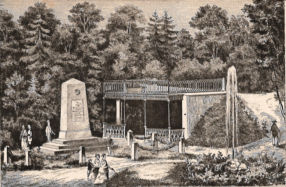 Litografia z przewodnika po Szczawnicy wydanego w Krakowie w 1869 roku